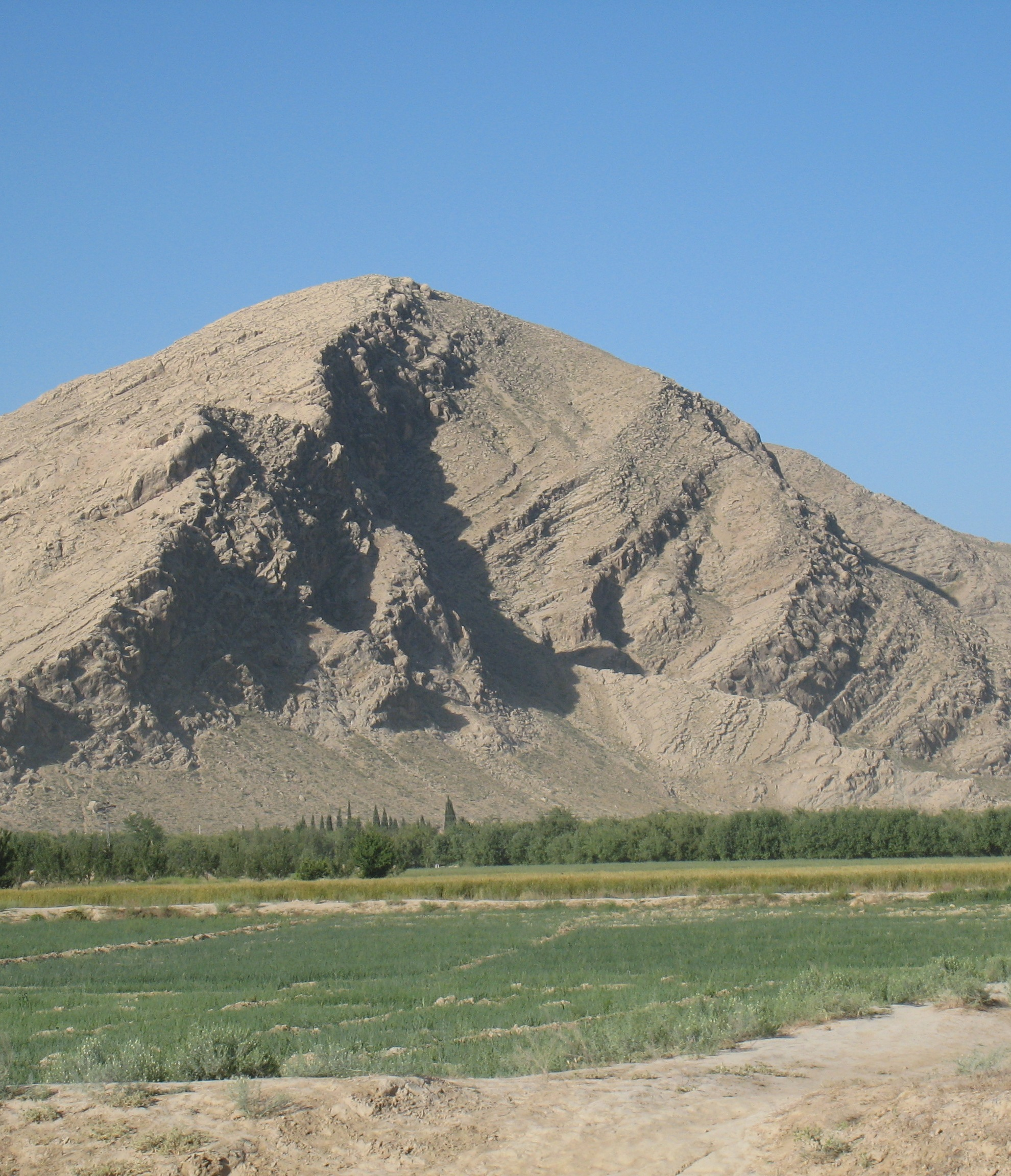 Foto: Gregor Enste